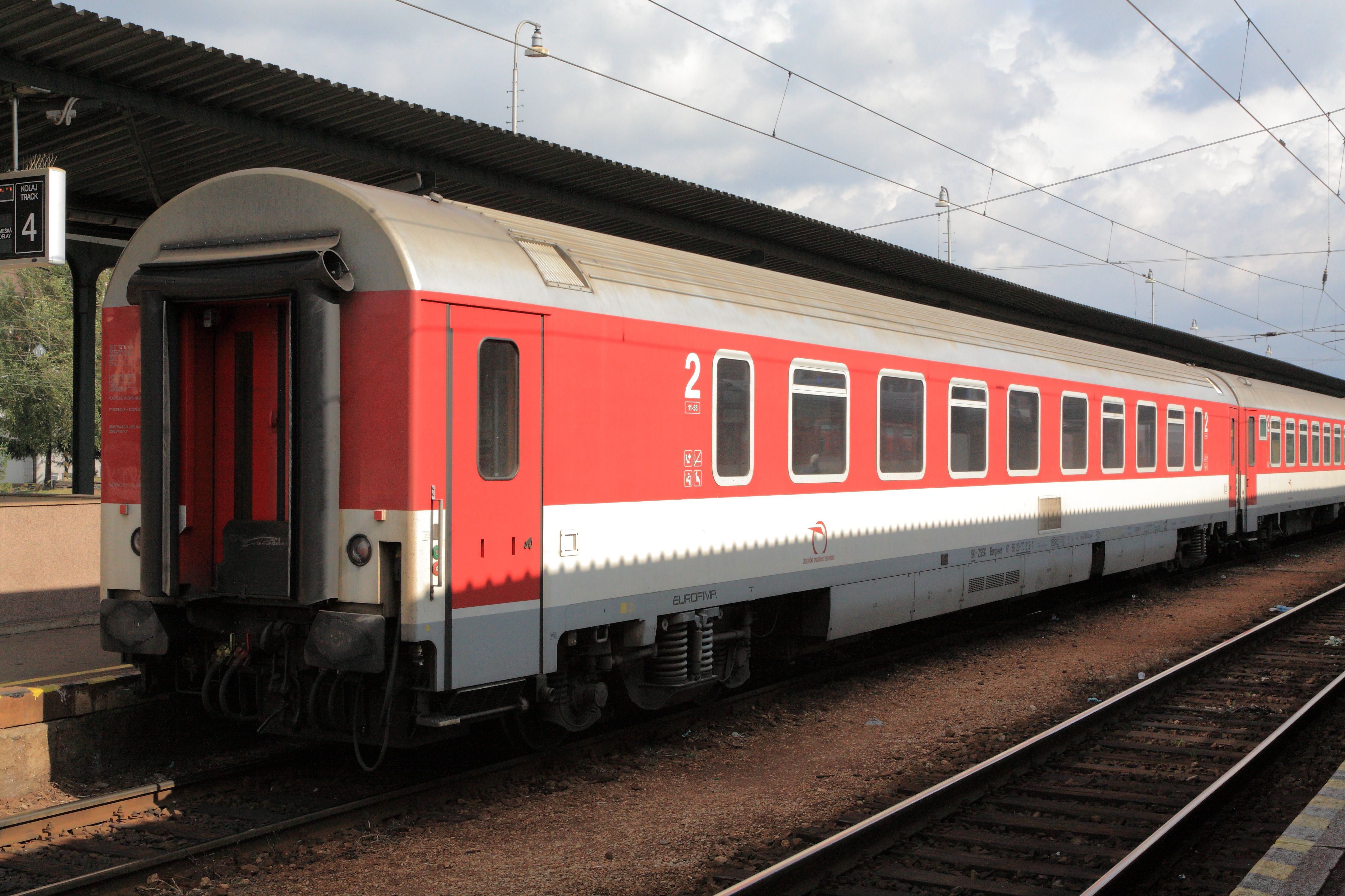 Eurofima-Großraumwagen der ZSSK. Sichtbare äußere Unterschiede zu den Wagen aus Bautzen sind die Drehgestellbauart und das gesickte Dach.